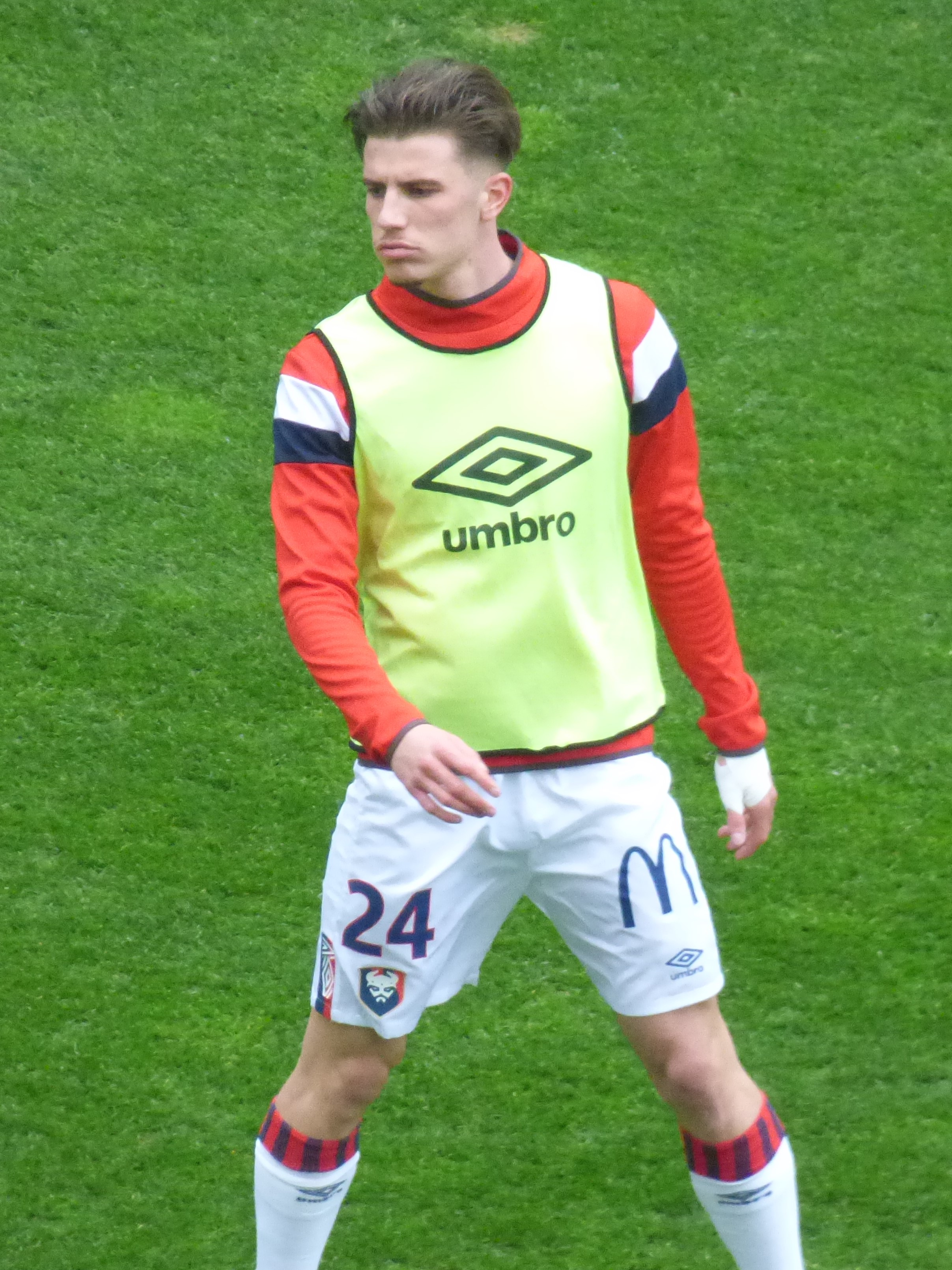 Hugo Vandermersch avant le match RC Lens / SM Caen, comptant pour la vingt-sixième journée du championnat de France de football de Ligue 2 2019/2020, le 22 février 2020, au Stade Bollaert-Delelis